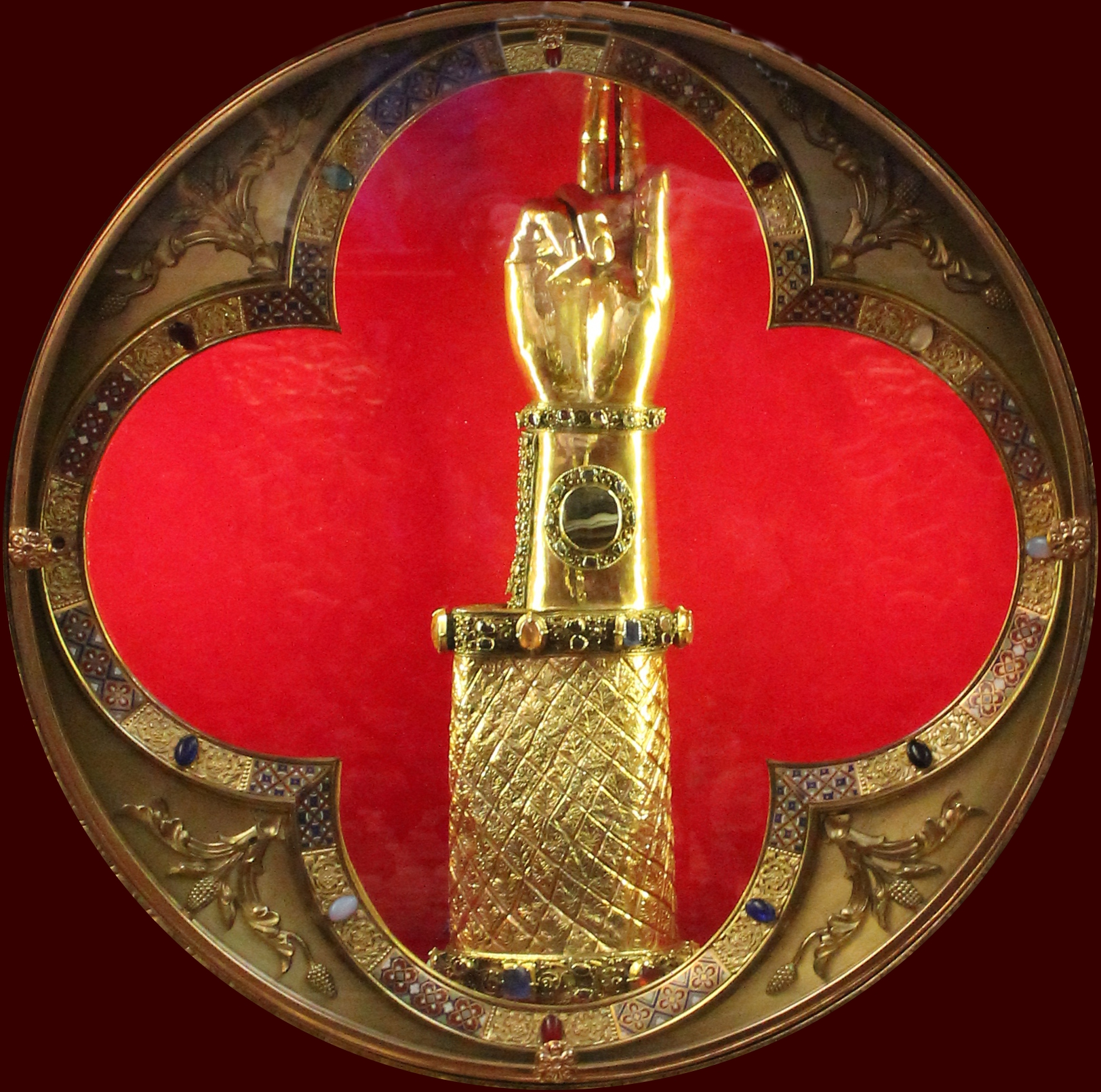 Armreliquiar der hl. Elisabeth von Thüringen in der Kapelle von Schloss Sayn